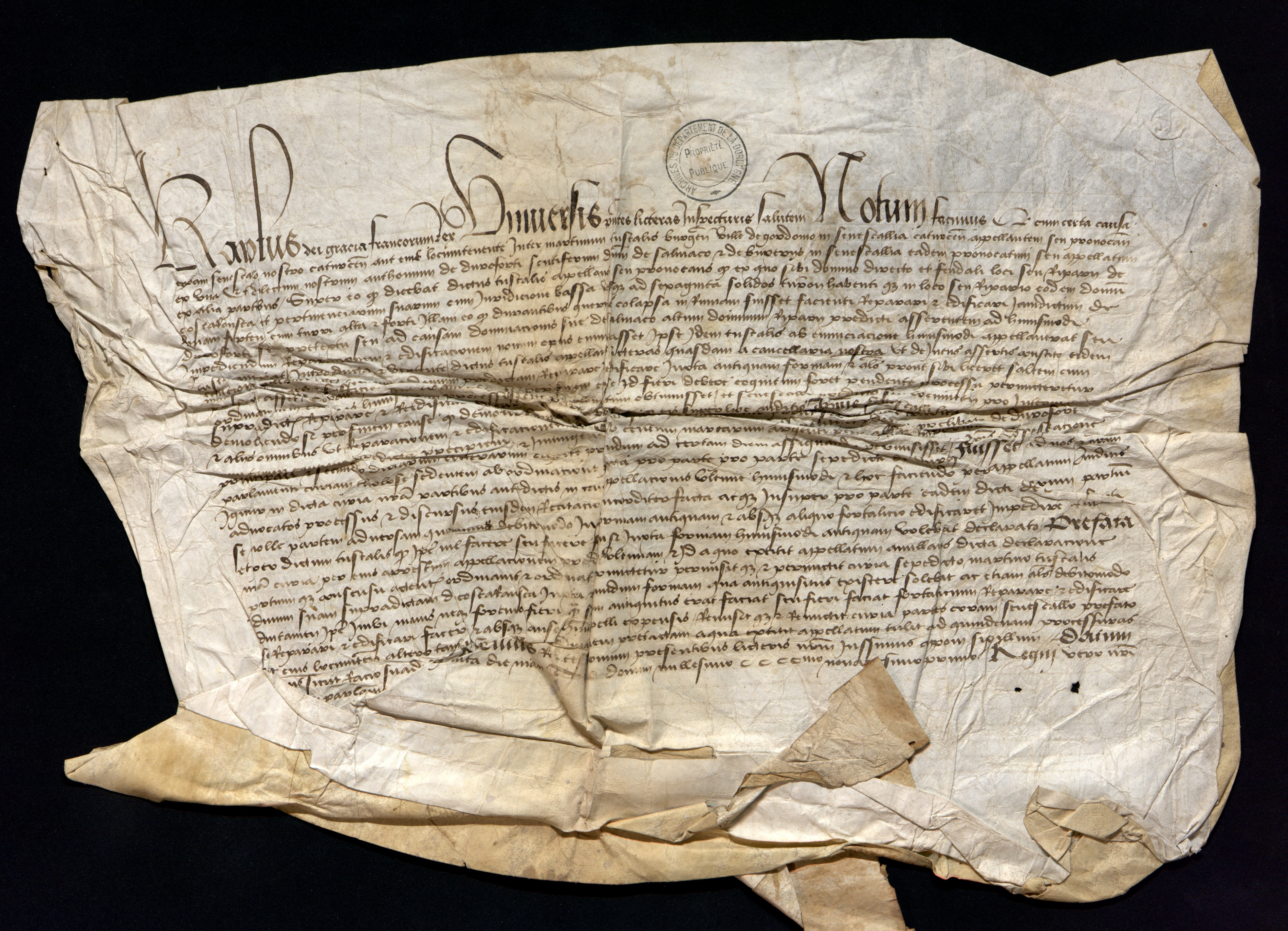 parchemin 1491